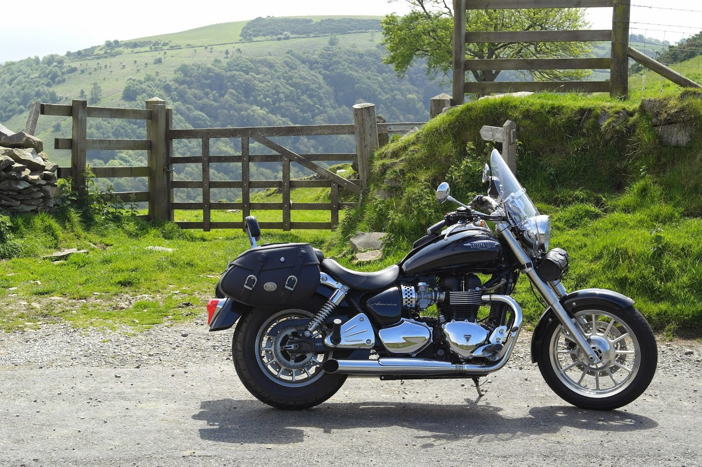 Triumph America Bj.2010 inkl. Zubehör